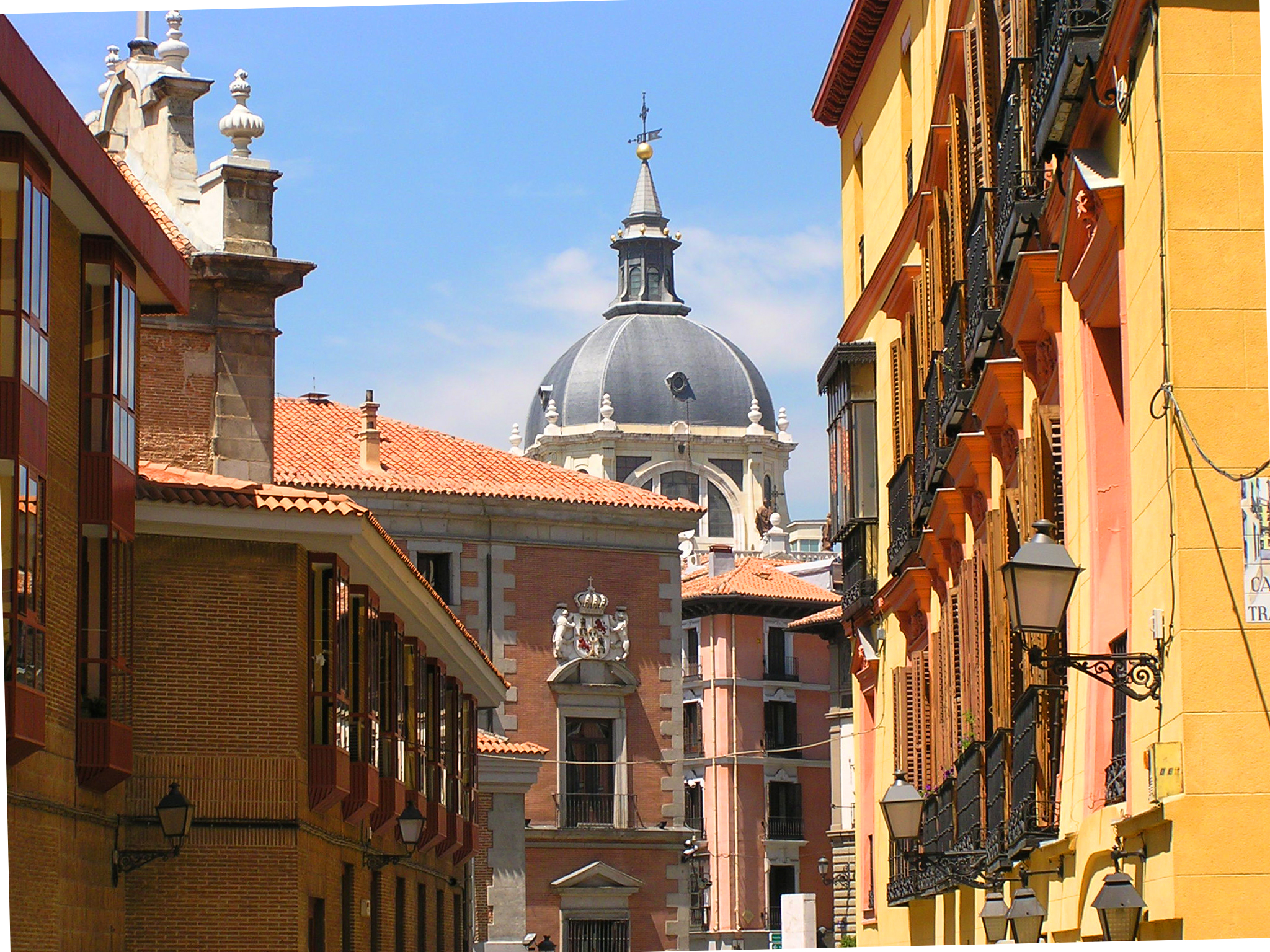 Palacio, Madrid, Madrid, Spain